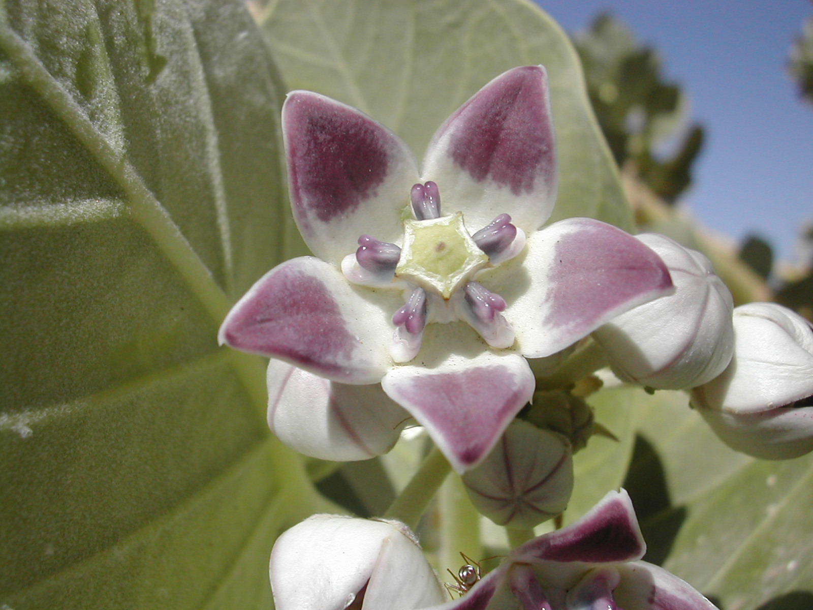 Fleur de l'arbre Thora Thora (Calotropis procera), Algérie